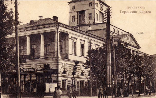 Postcards of old Kremenchuk. Міська управа. Вулиця Єкатерининська, колишній проспект Революції, сучасна Леніна.